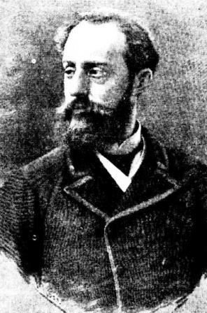 Portrait von Eusebi Güell